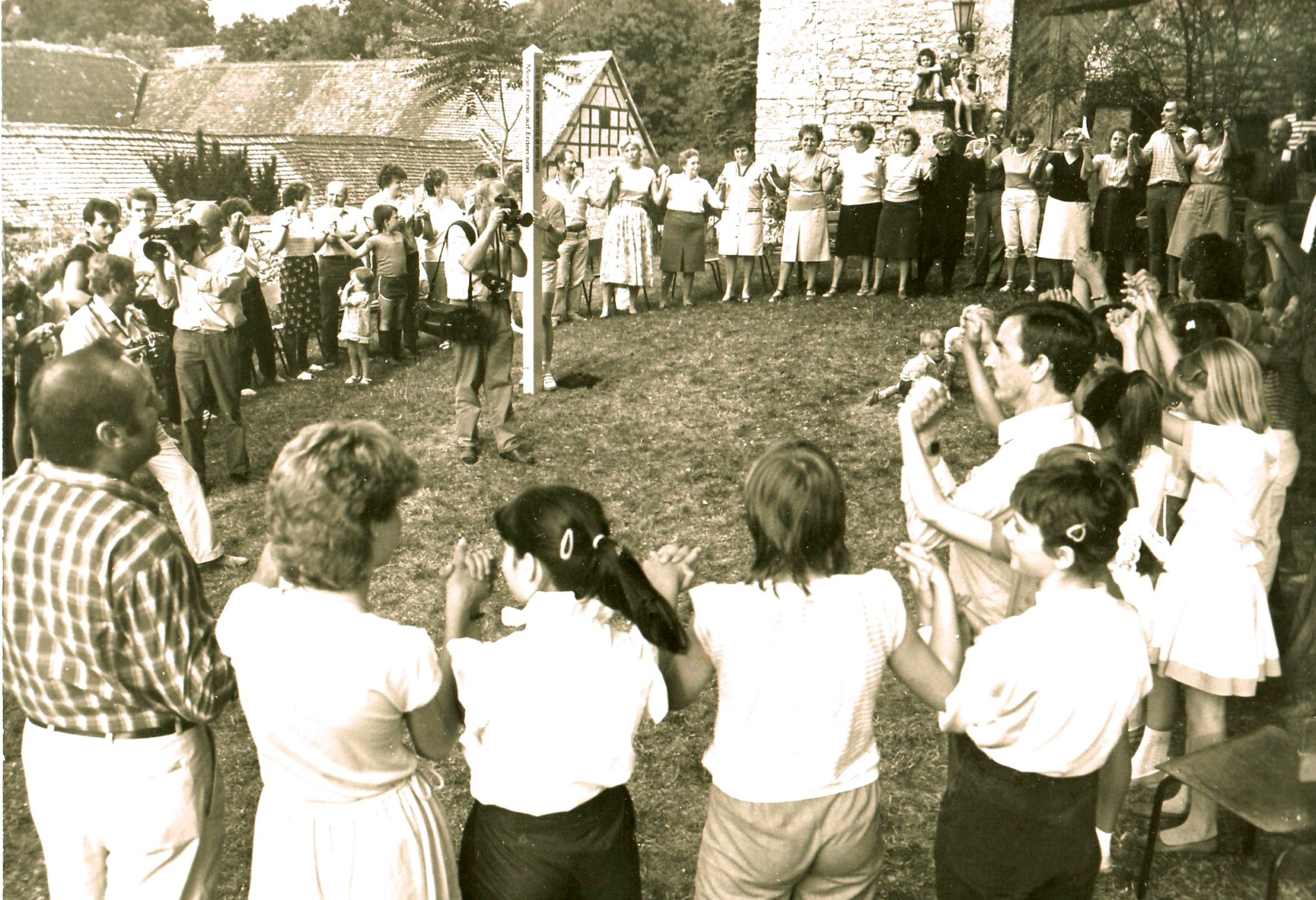 Setzen eines Friedenspfahles in Kapellendorf